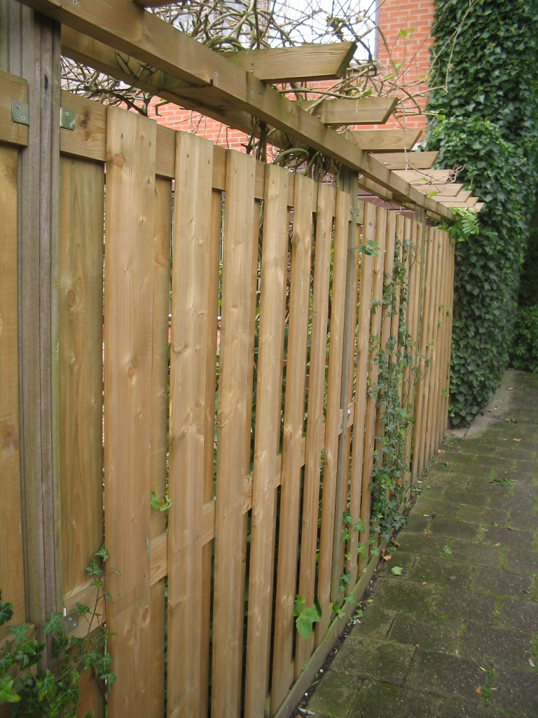 schutting bij mij in de buurt, Delft, oktober 2005